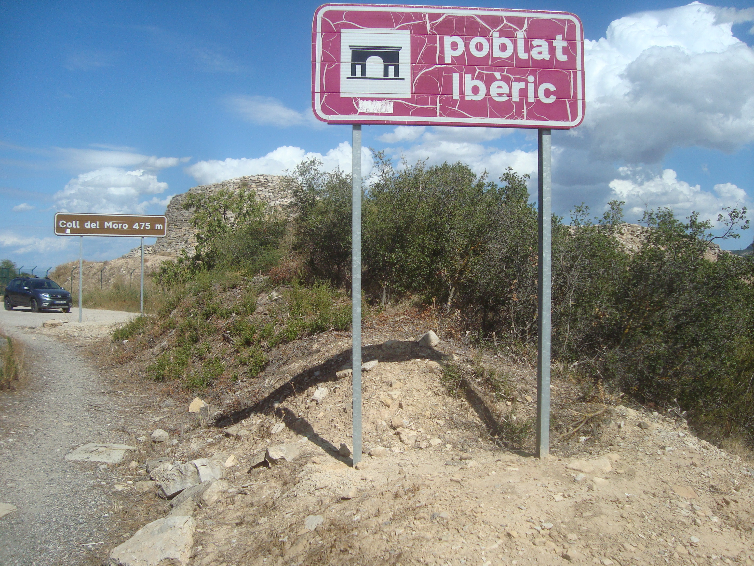 Poblat del Coll del Moro (Gandesa)